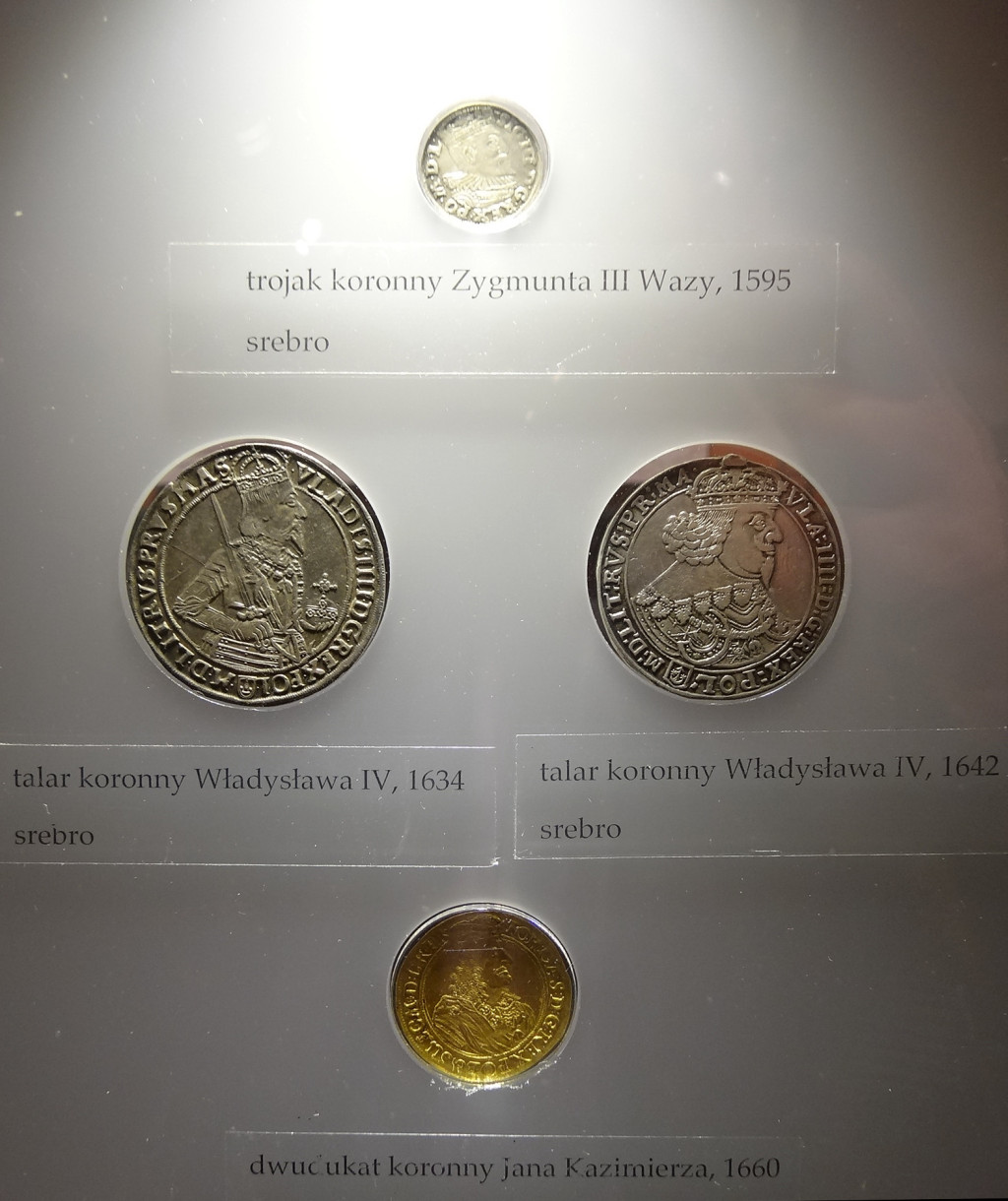 Wystawa starych monet polskich, niektórych wybijanych w mennicy bydgoskiej z XVII w. w Europejskim Centrum Pieniądza Muzeum Okręgowego im. Leona Wyczółkowskiego na Wyspie Młyńskiej w Bydgoszczy